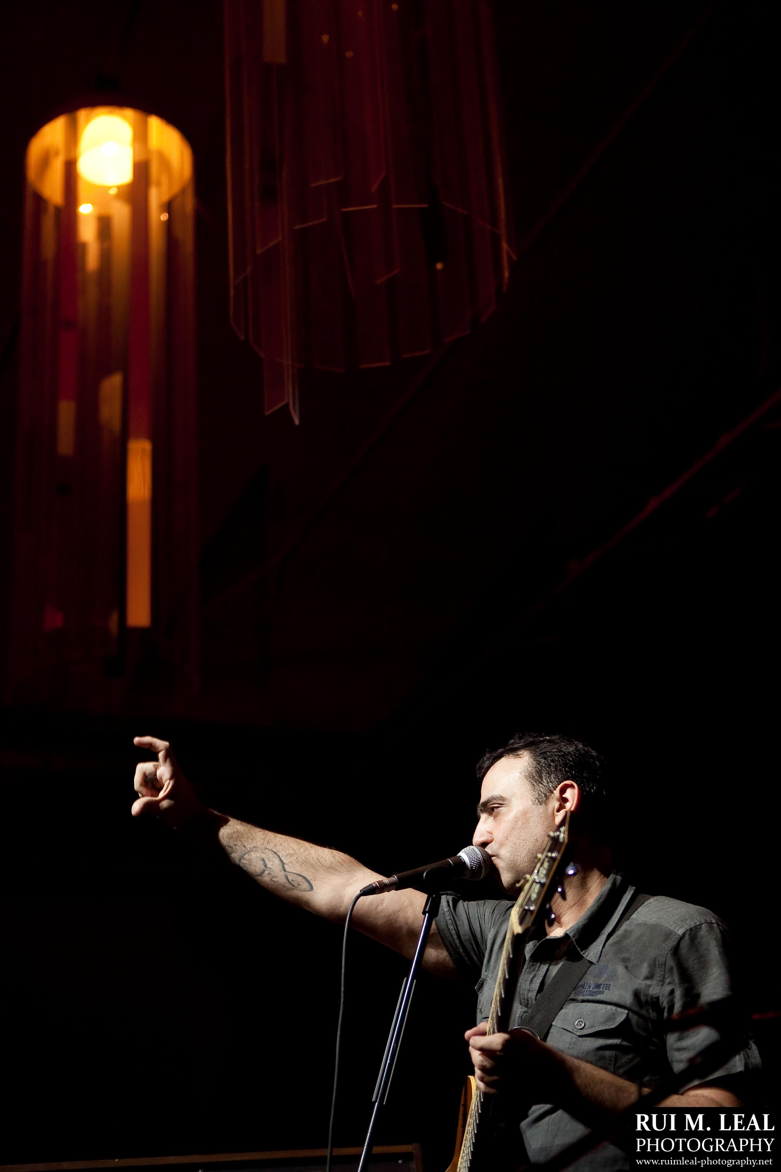 Paulo Brissos ao vivo na discoteca OP no Cacem, Portugal